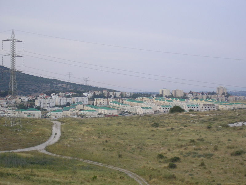 יקנעם עילית, מבט מדרום. צולם על ידי